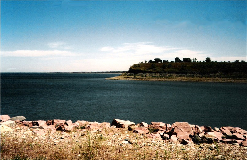 Lake Sakakawea in North Dakota, near Garrison Dam